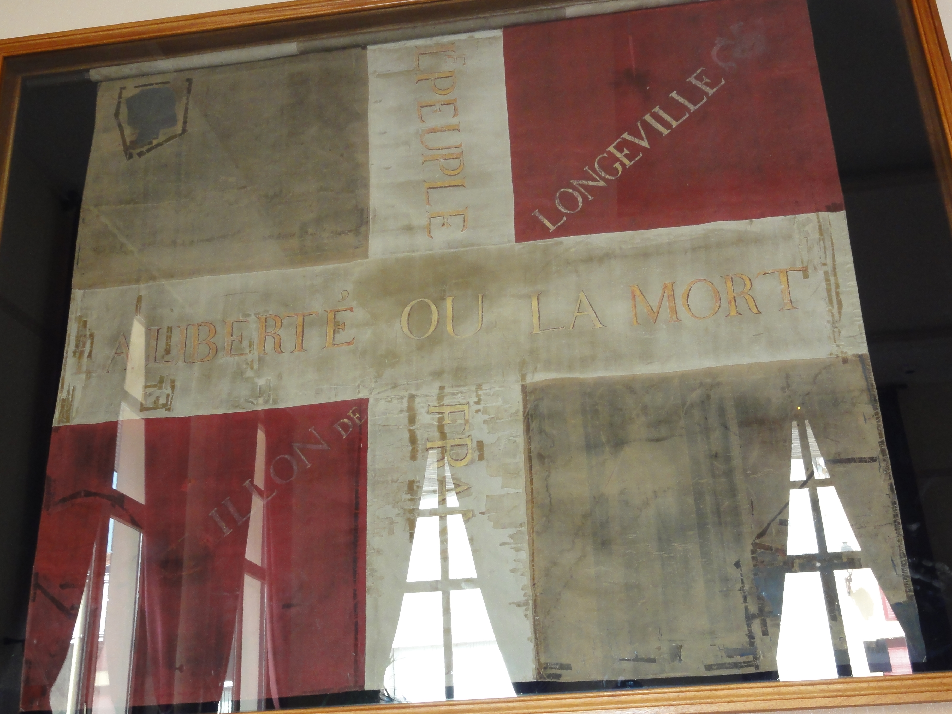 Longeville-en-Barrois (Meuse) broderie La liberté ou la mort (01) exposée dans la mairie